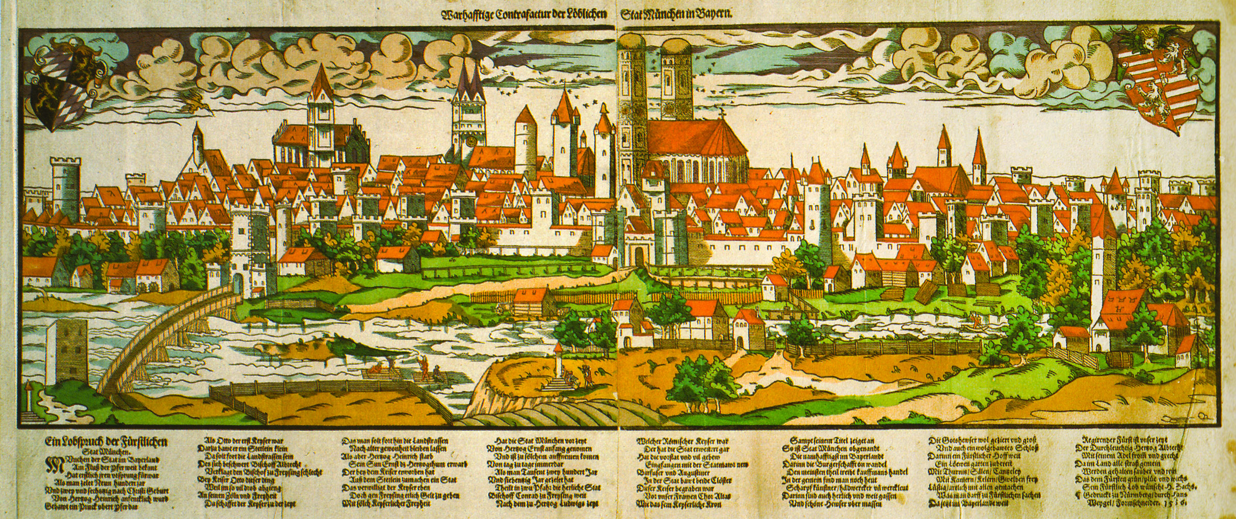 Stadtansicht von München